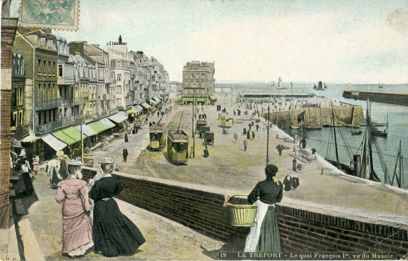 Carte postale ancienne éditée par L. V. & Cie, N° 19LE TRÉPORT : Le quai François 1er, vu du MusoirAu second plan, deux motrices du tramway d'Eu-Le Tréport-Mers